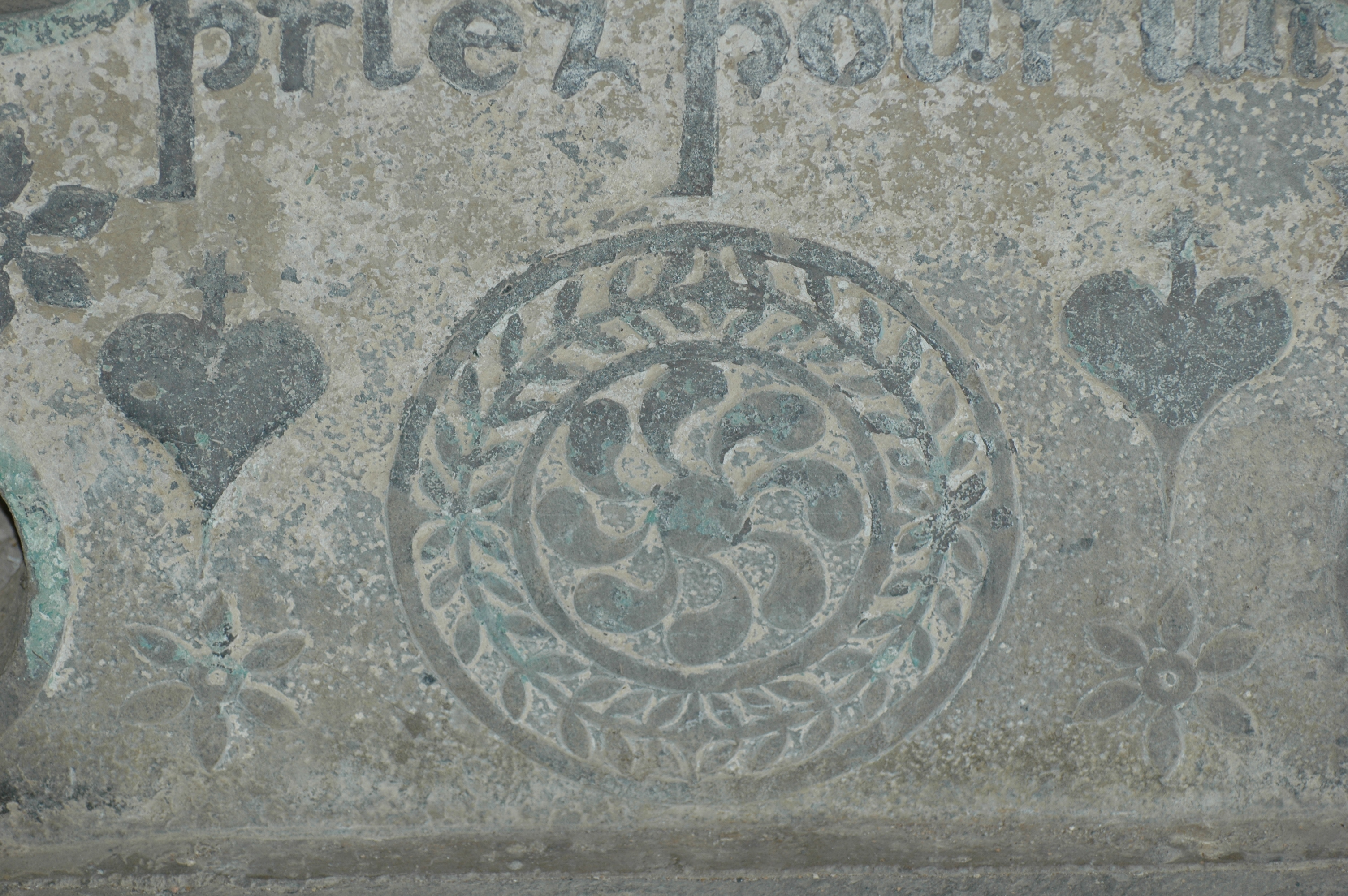 Iholdy, lauburu à 8 branches